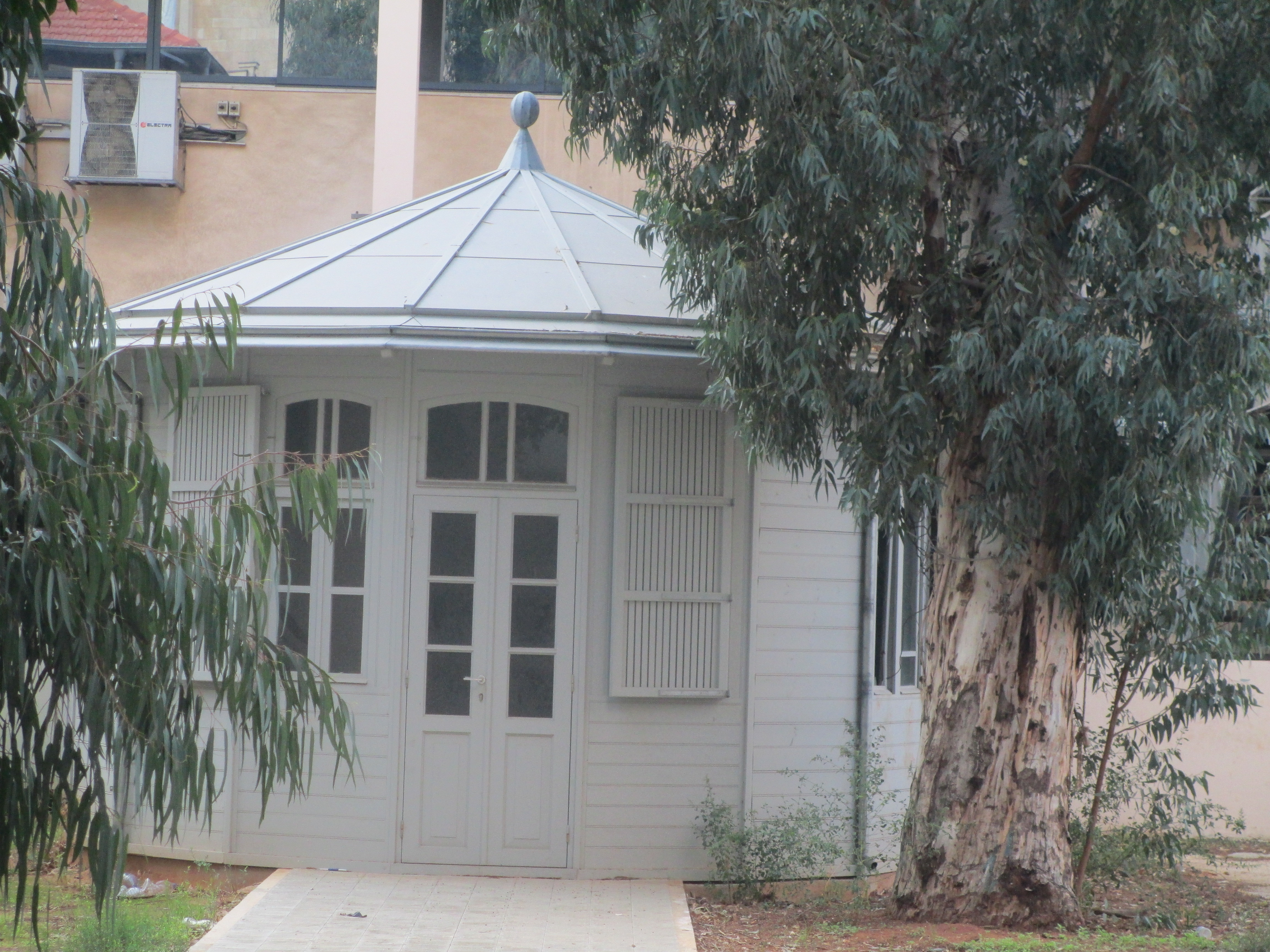 הקיוסק/גזיבו בחצר בית פולאק ברח' אחד העם 20 בתל אביב